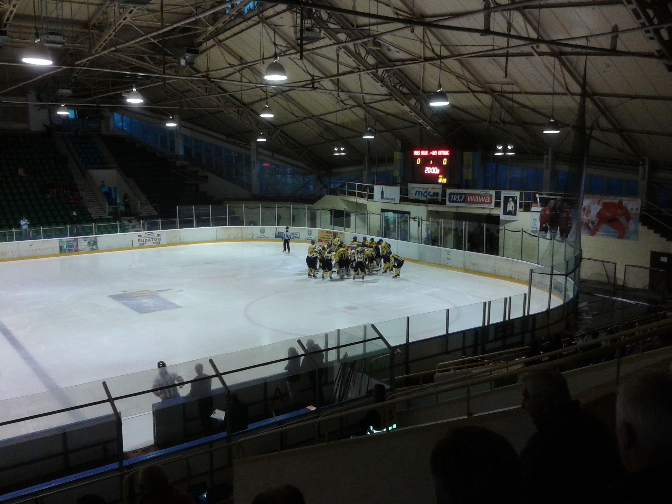 Drużyna Orlika Opole w 2014 roku.